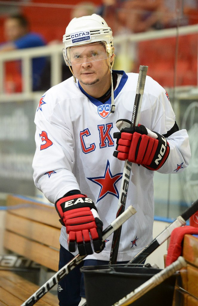 Валерий Покровский